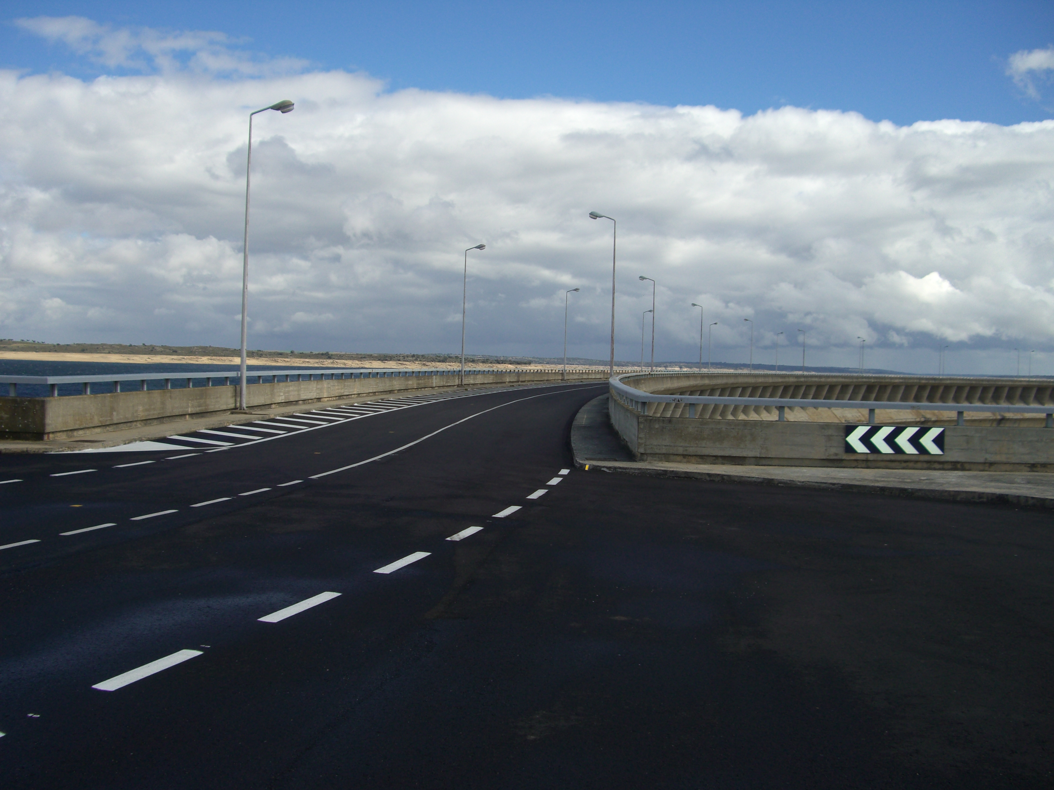 CIMG3664